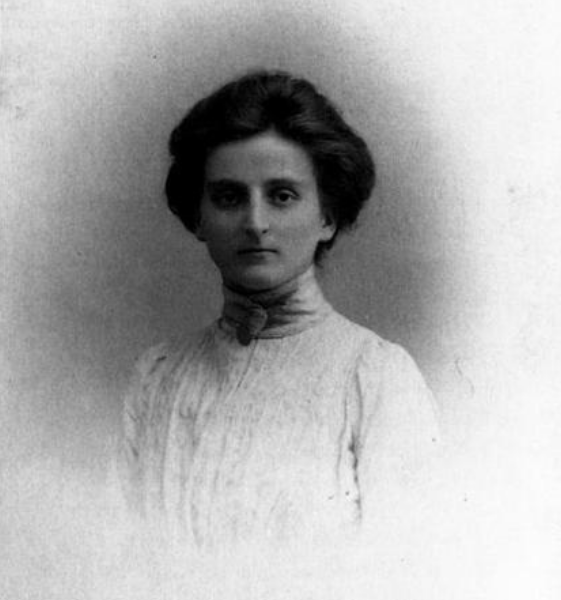 Helene Preiswerk (1881-1911)